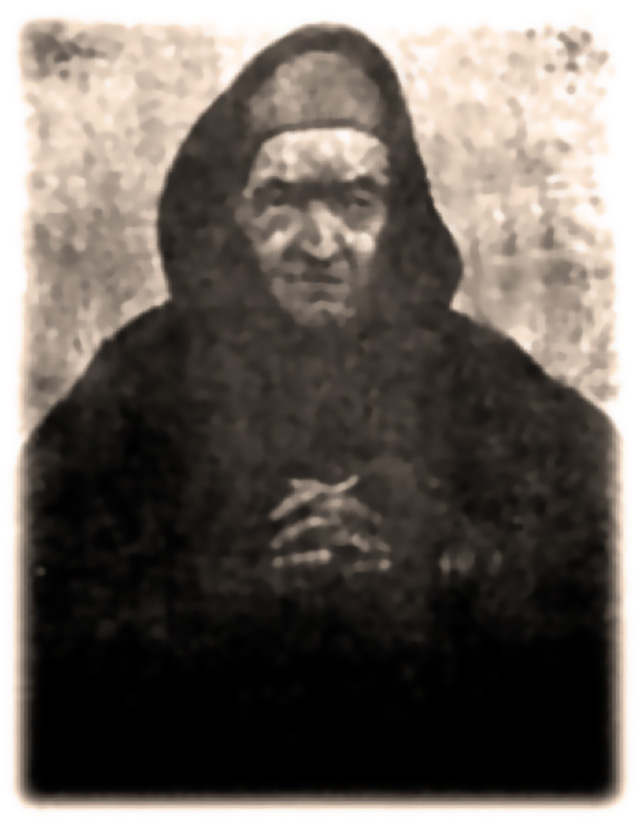 Jean-Claude Courveille, fondateur des Maristes, société de Marie